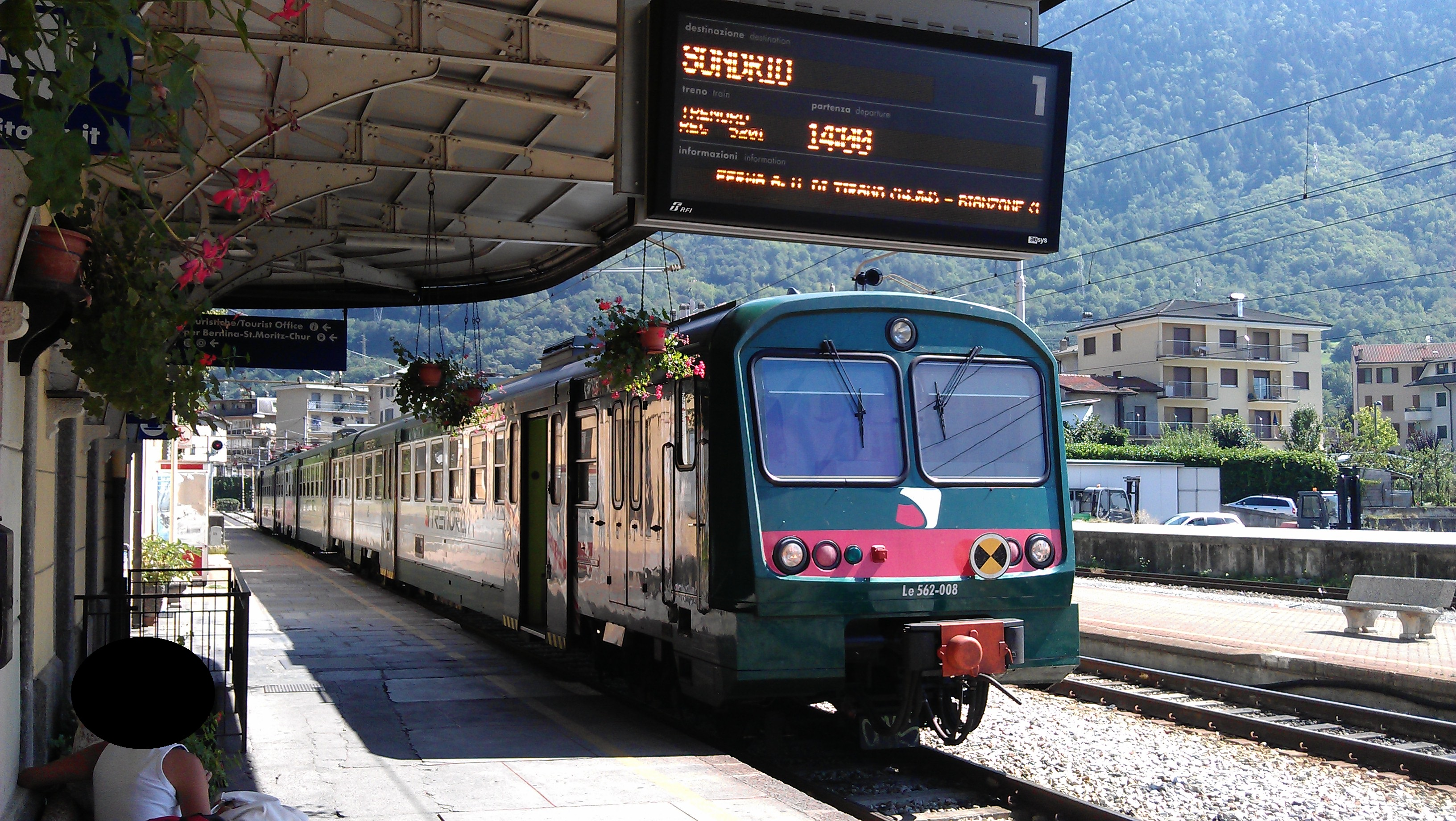 Una carrozza rimorchiata semipilota Le 562 in sosta presso il primo binario della stazione di Tirano, in attesa di espletare il Regionale 5201 diretto a Sondrio